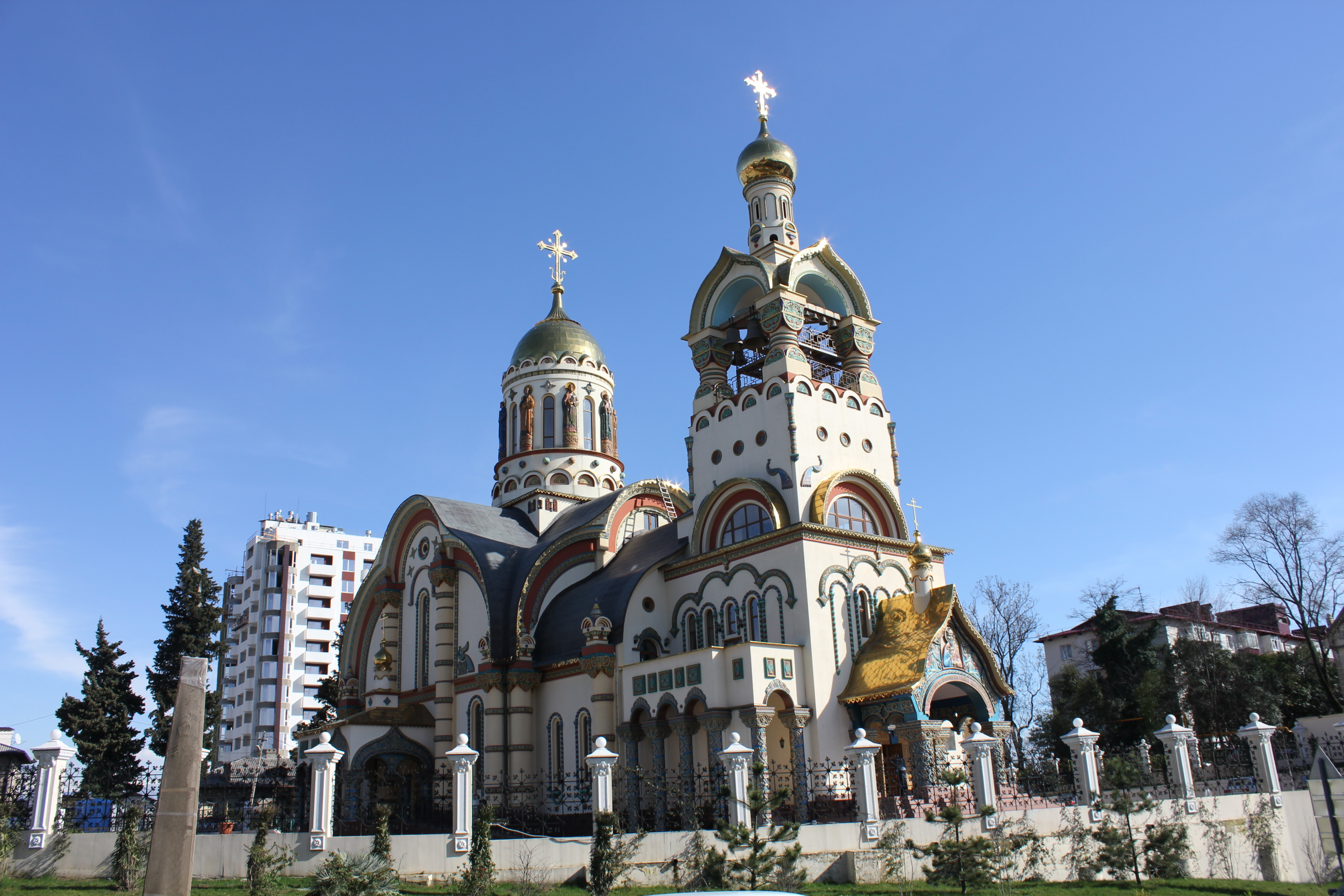 снято 14.03.2013